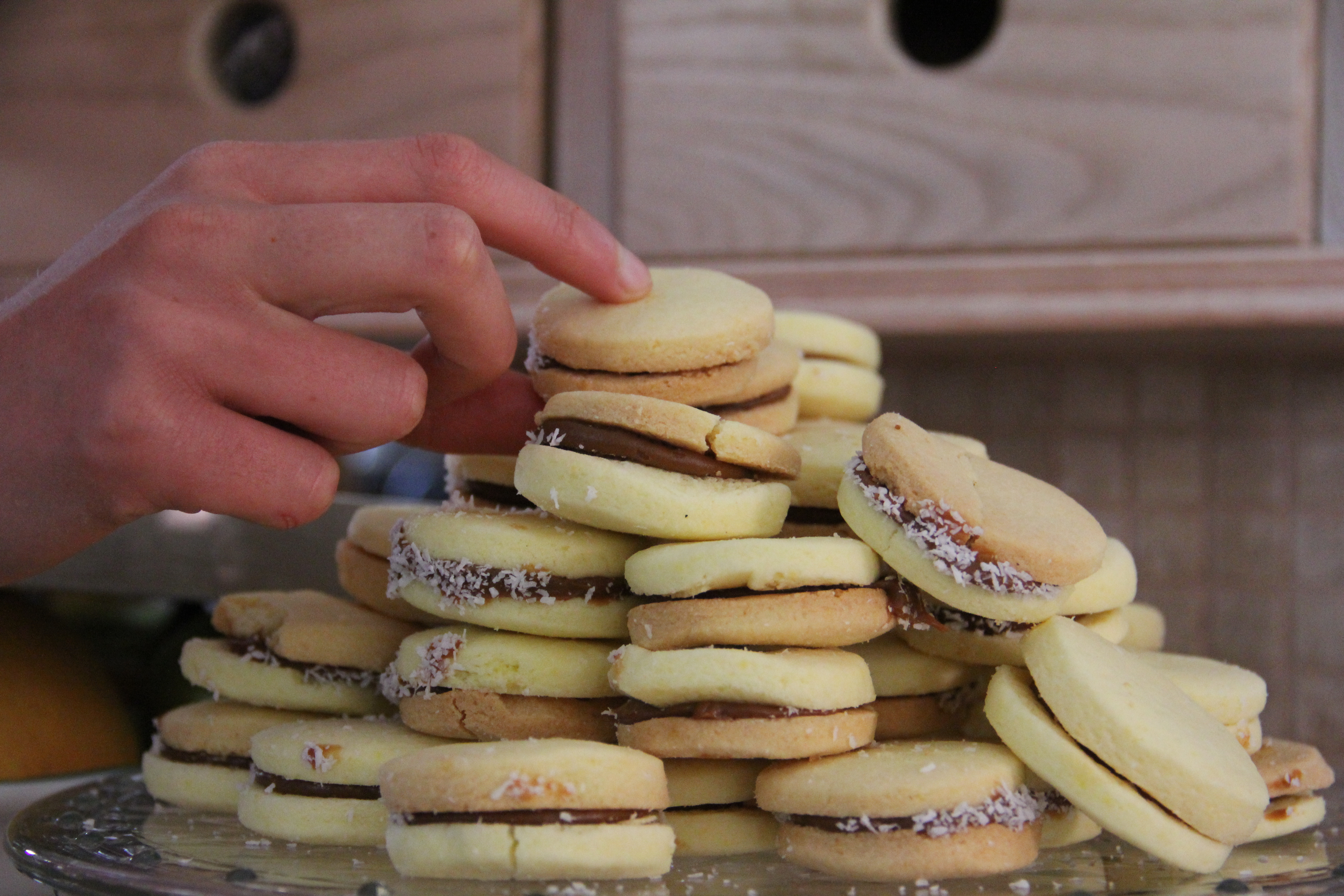 אלפחורס